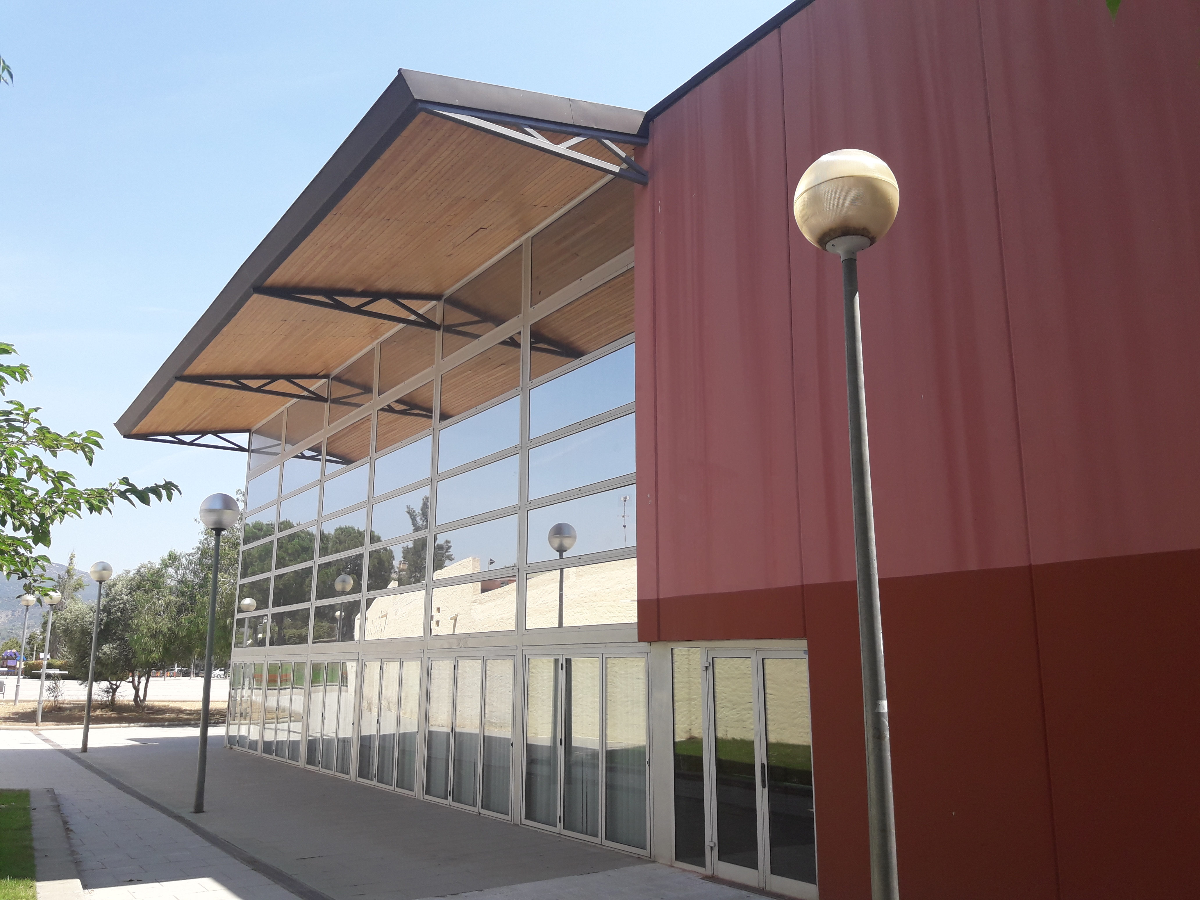 Façana lateral de la bilbioteca